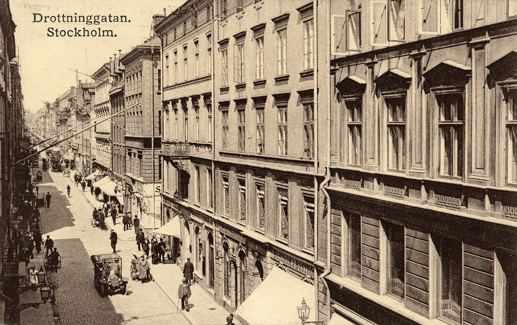 Drottninggatan 16, 18, 20, norrut (kvarteret Brunkhalsen)